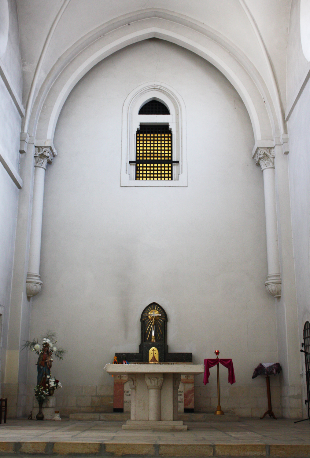 எங்கள் பிதாவே தேவாலயம் - உட்புறம்